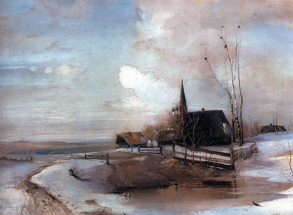 «"Ранняя весна".»title QS:P1476,ru:""Ранняя весна"." label QS:Lru,""Ранняя весна"."